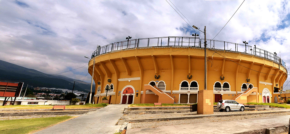 Plaza de toros Quito 2014. Fotografías: Carlos Rodríguez L.